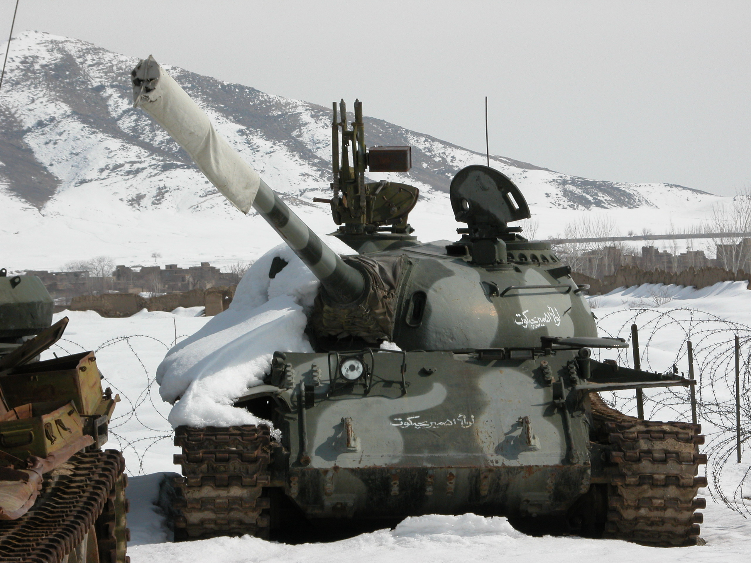 T 55 en afghanistan